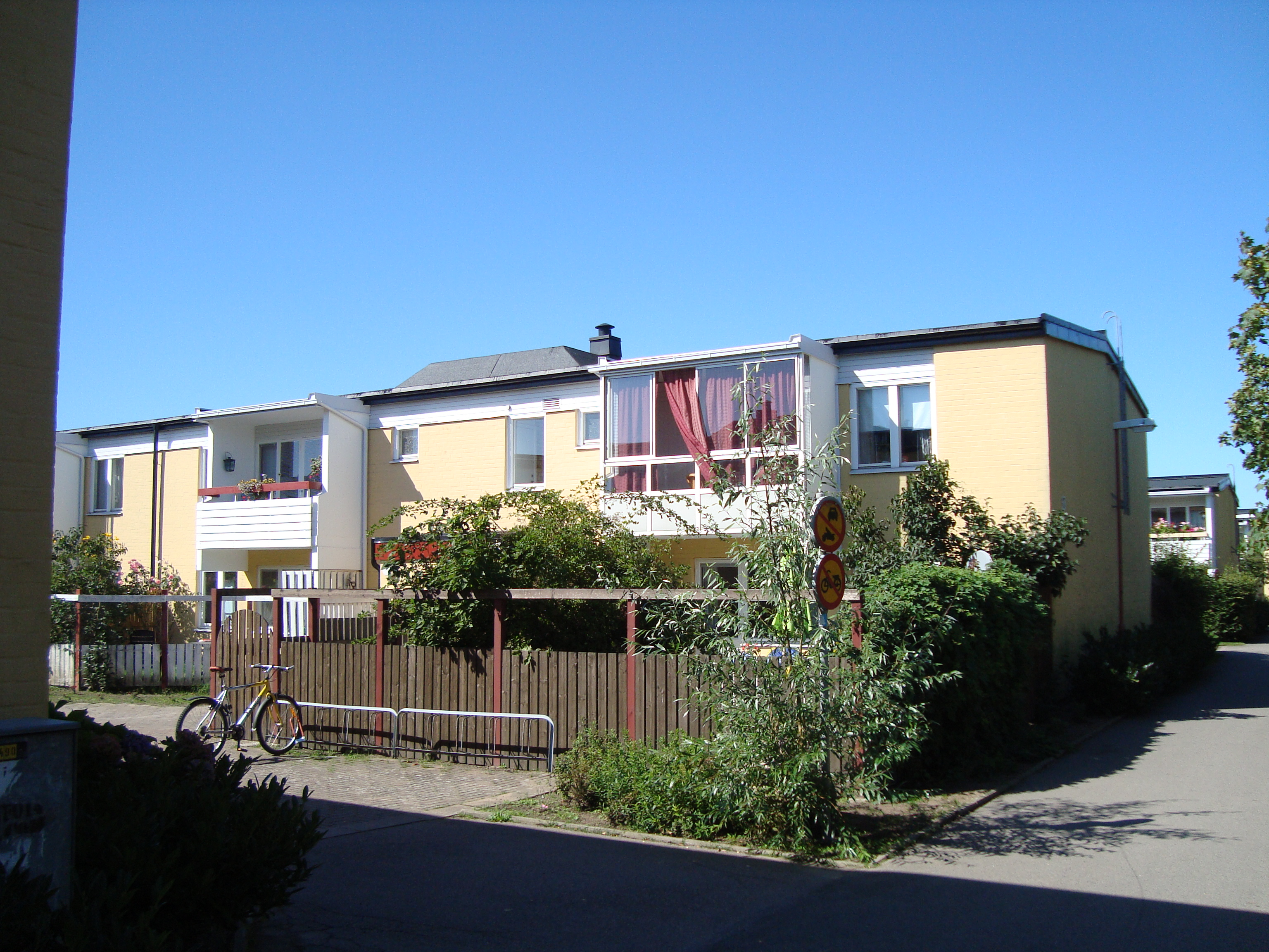 Bostadshus i Dalhem i Helsingborg.